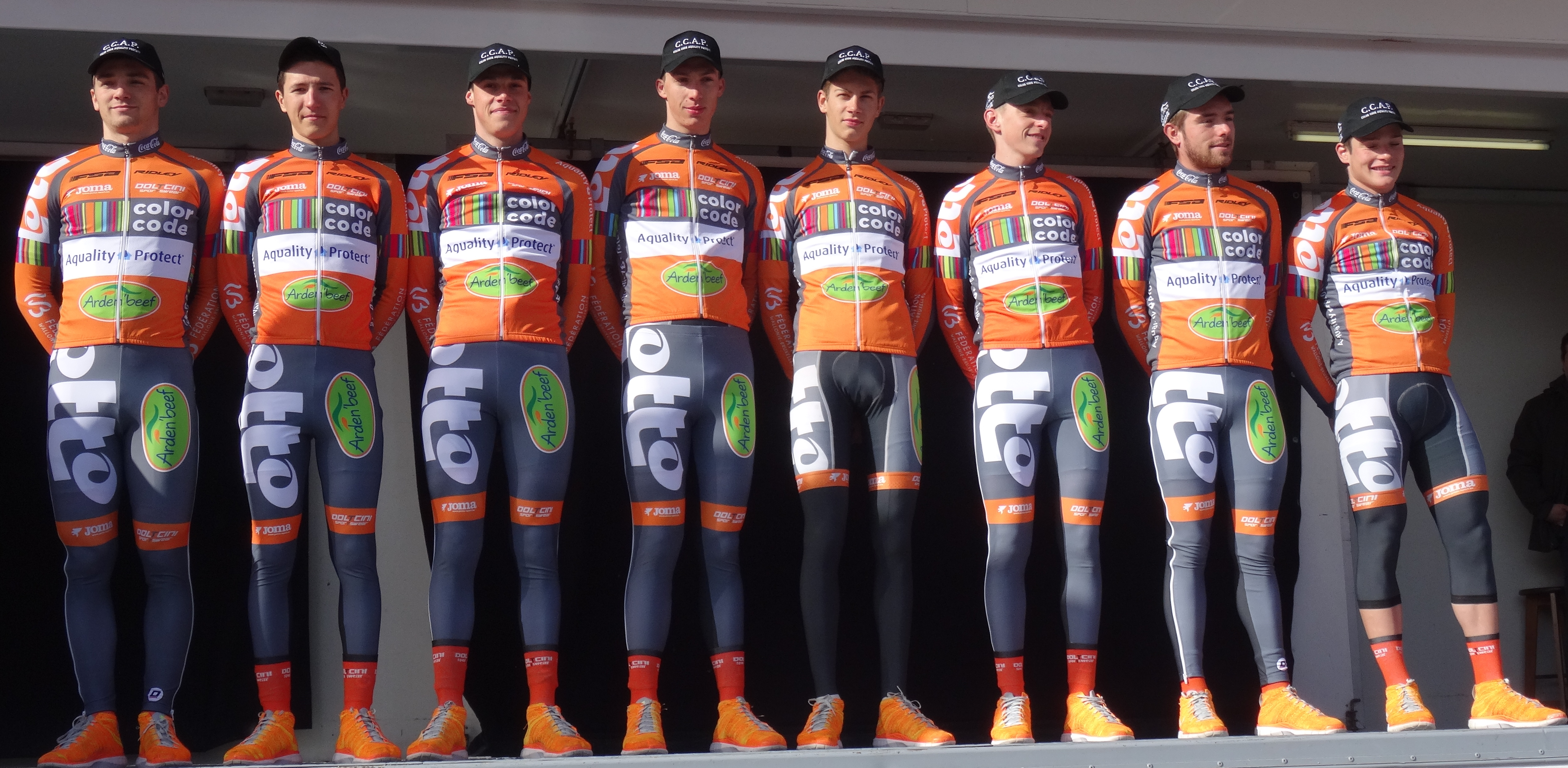 Reportage réalisé le mercredi 4 mars à l'occasion du départ du Samyn des Dames 2015 et du Samyn 2015 à Quaregnon, Belgique.